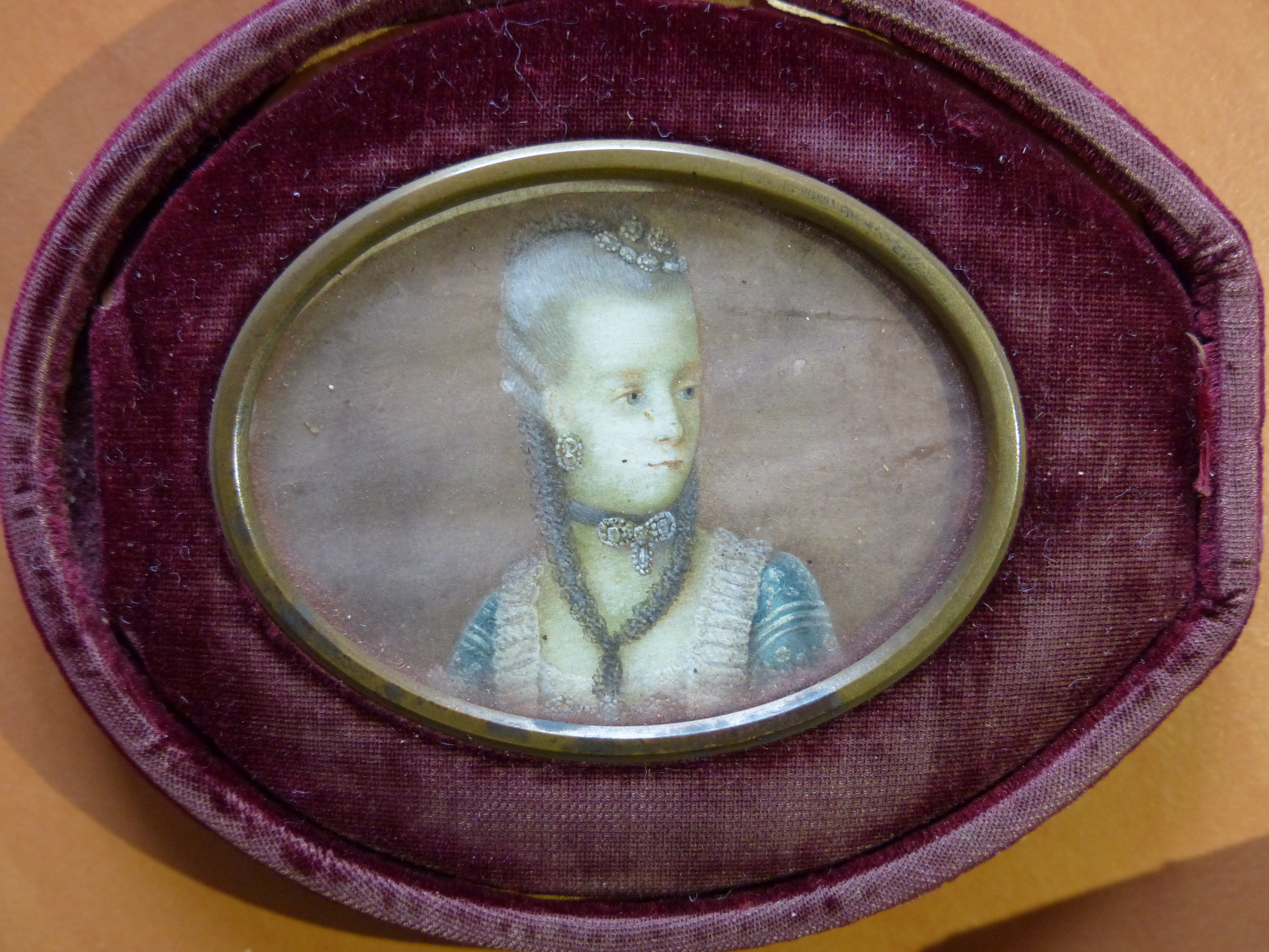 Portrait offert à M. de Flavigny , ministre plénipotentiaire à Parme de 1772 à 1793